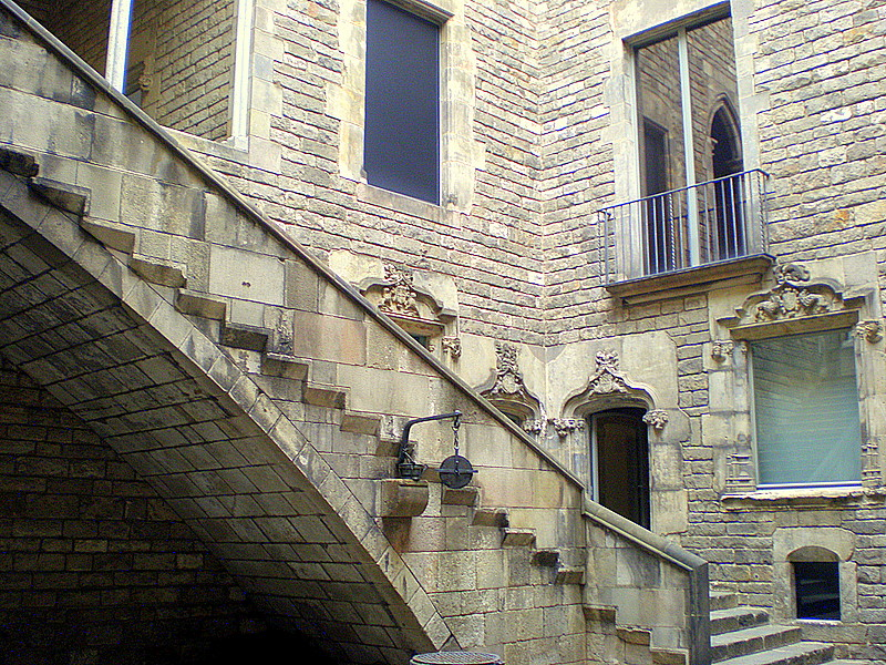 Barcelona - Escala del pati d´entrada del Museu de Història de la Ciutat